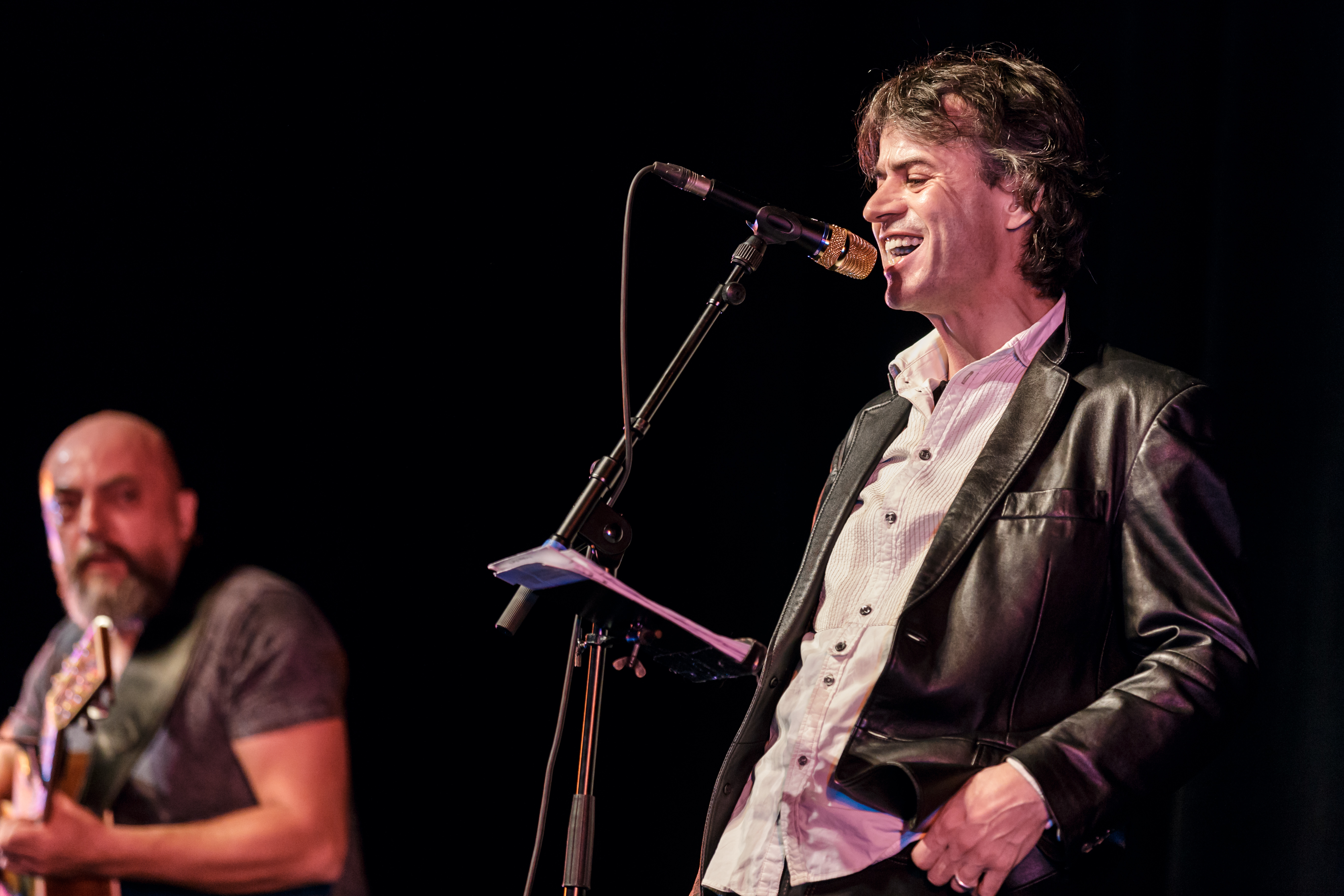 Les Frères Guichen invitent Denez Prigent en fest-noz lors du festival Yaouank le 19 novembre 2016 au MusikHall du Parc Expo de Rennes.